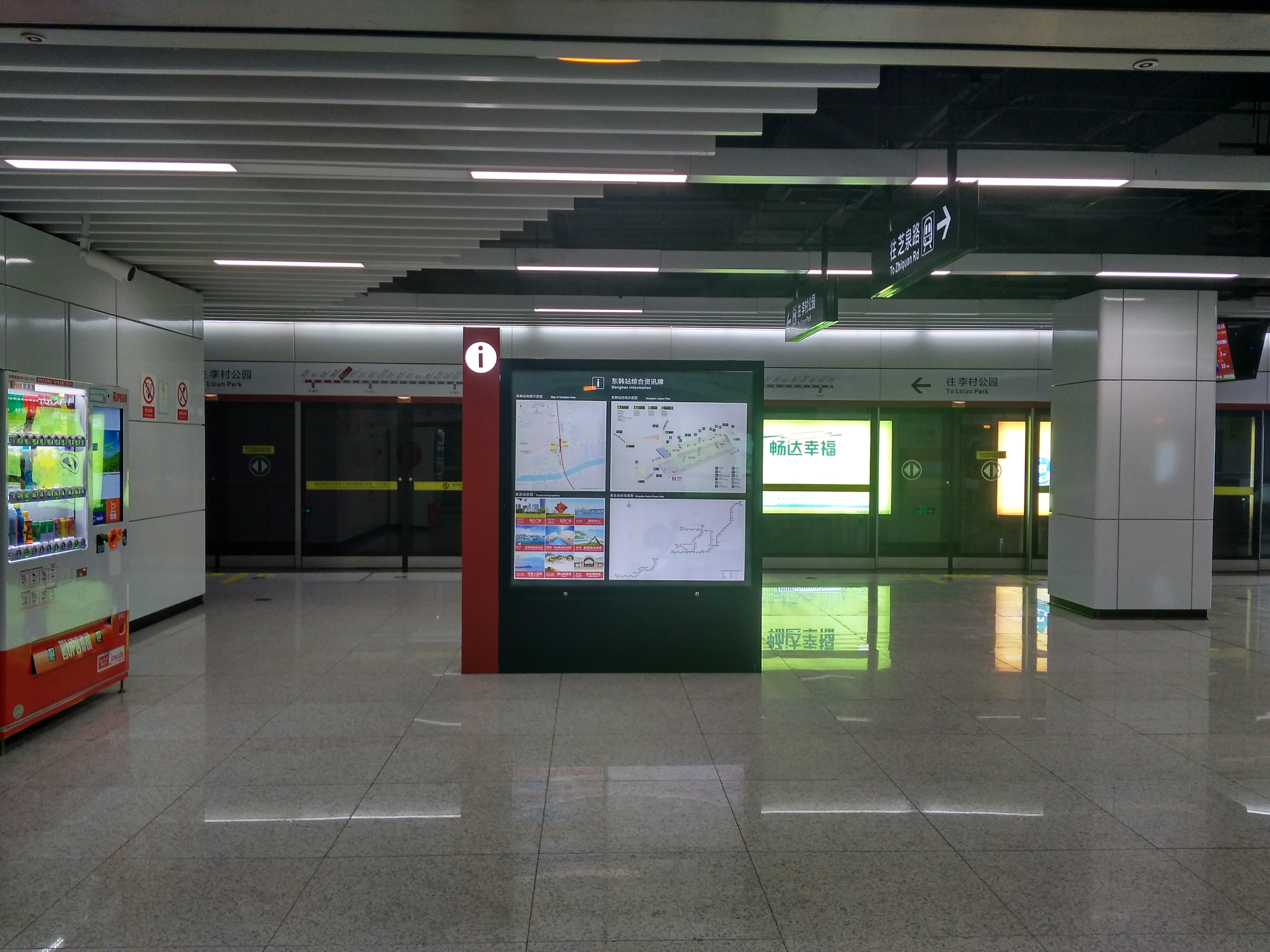 东韩站站台